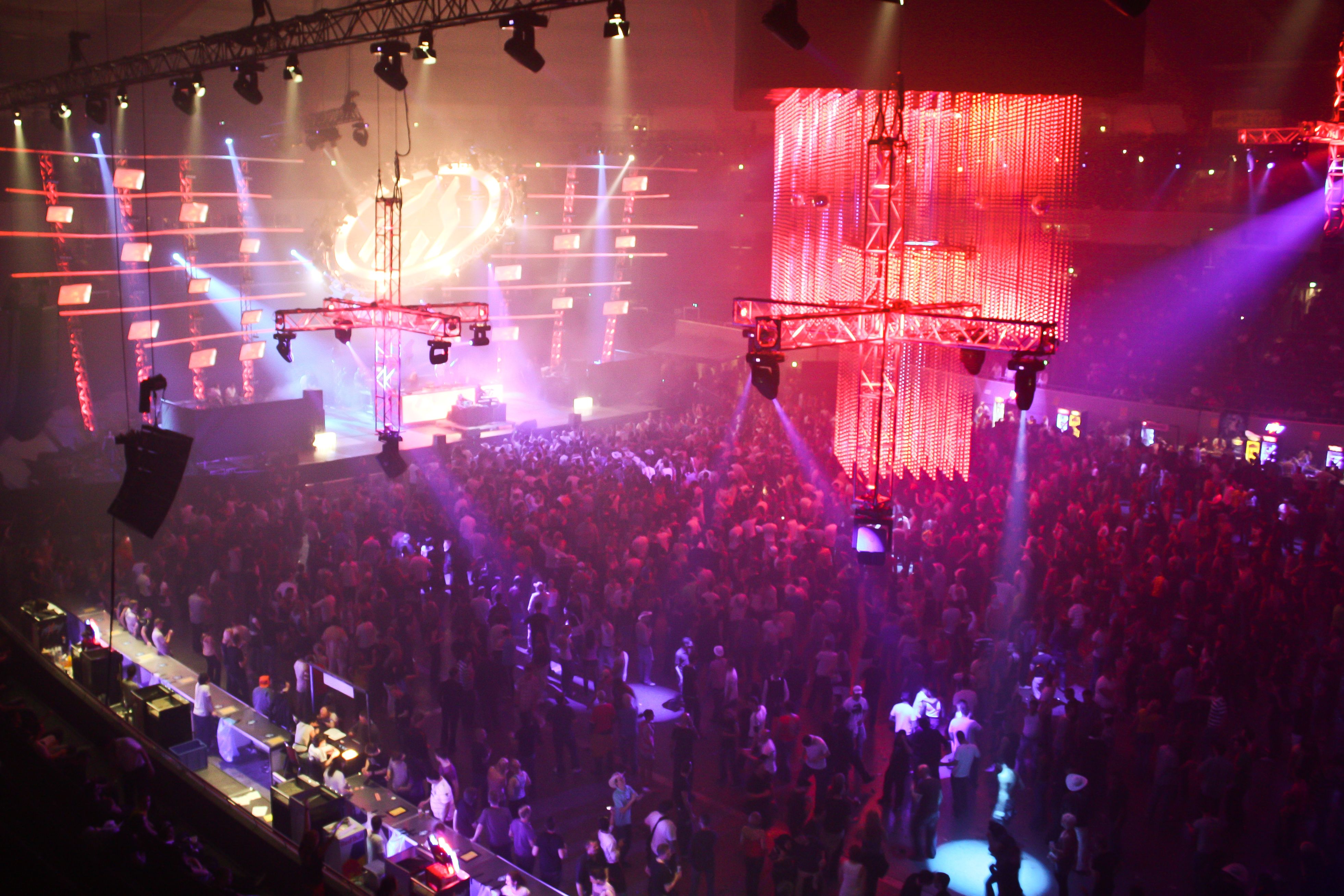 Halle 1 der Mayday 2009 in Dortmund, Blick auf die Hauptbühne